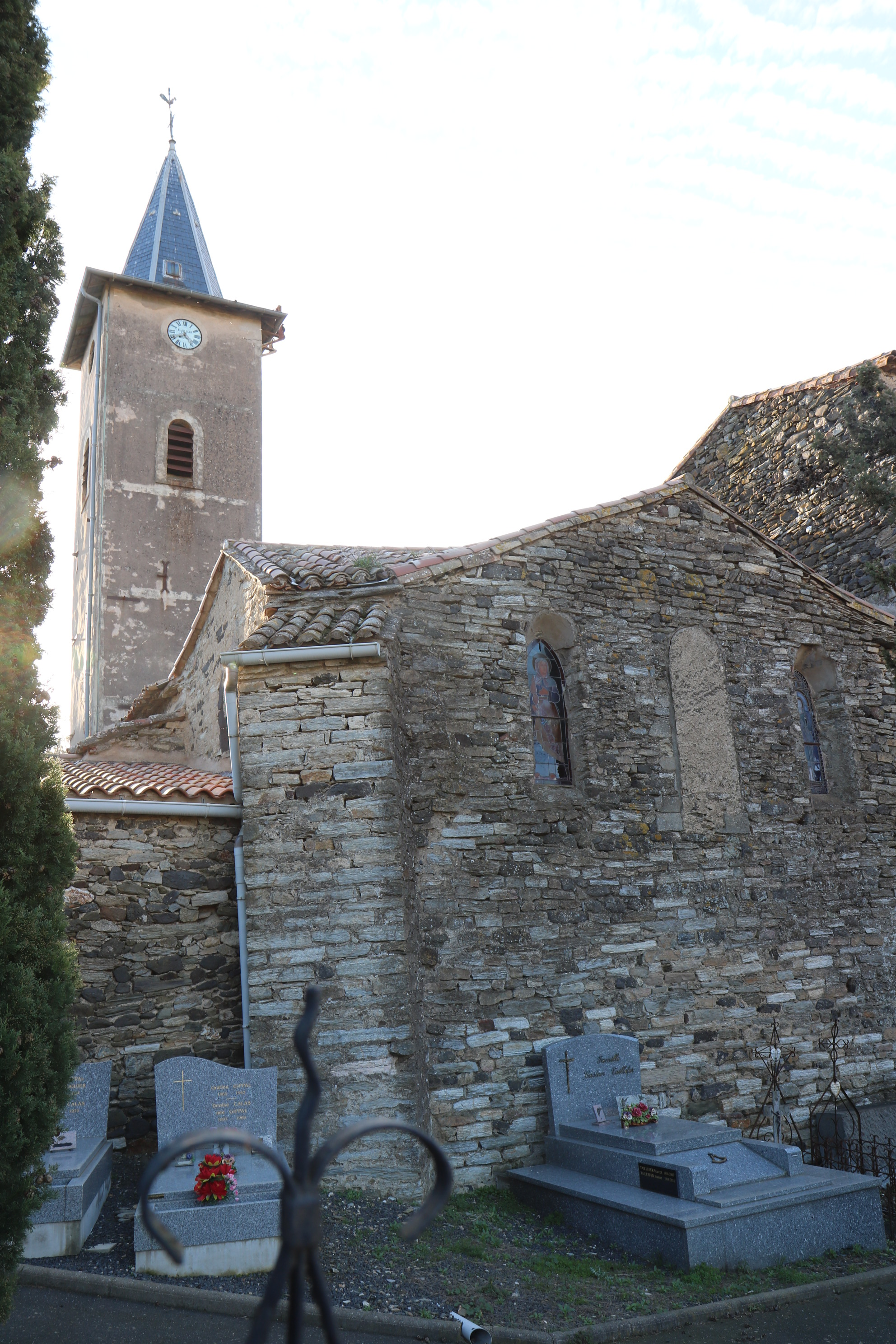 Fos (Hérault) - église Saint-Jean - chevet et clocher - cimetière